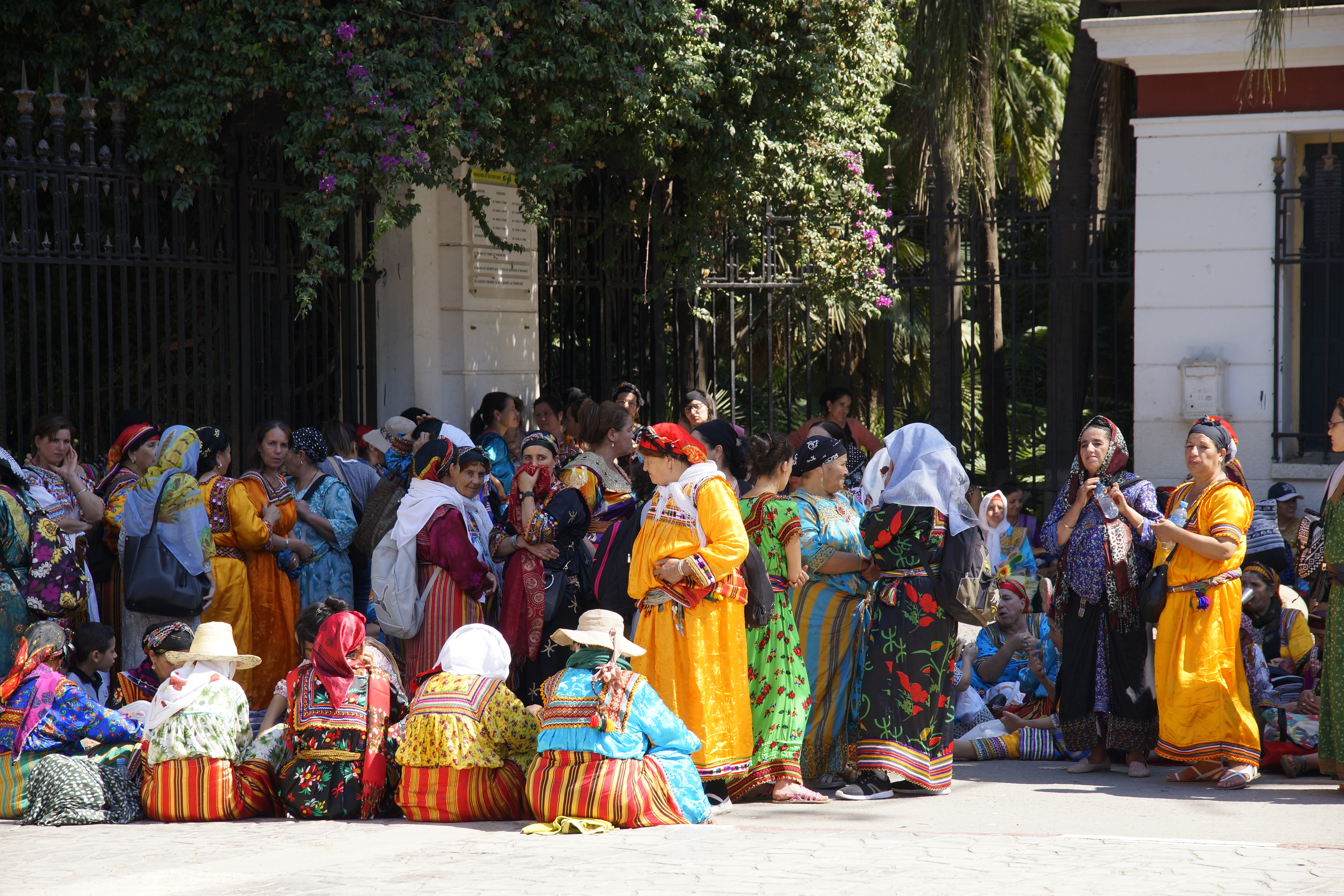 femmes Kabyles